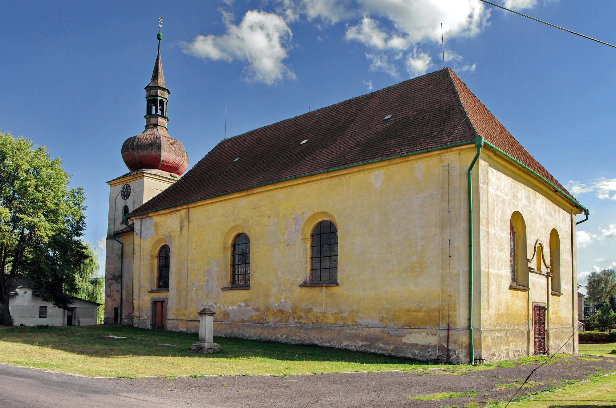 Trstěnice, kostel svatého Víta, okres Cheb